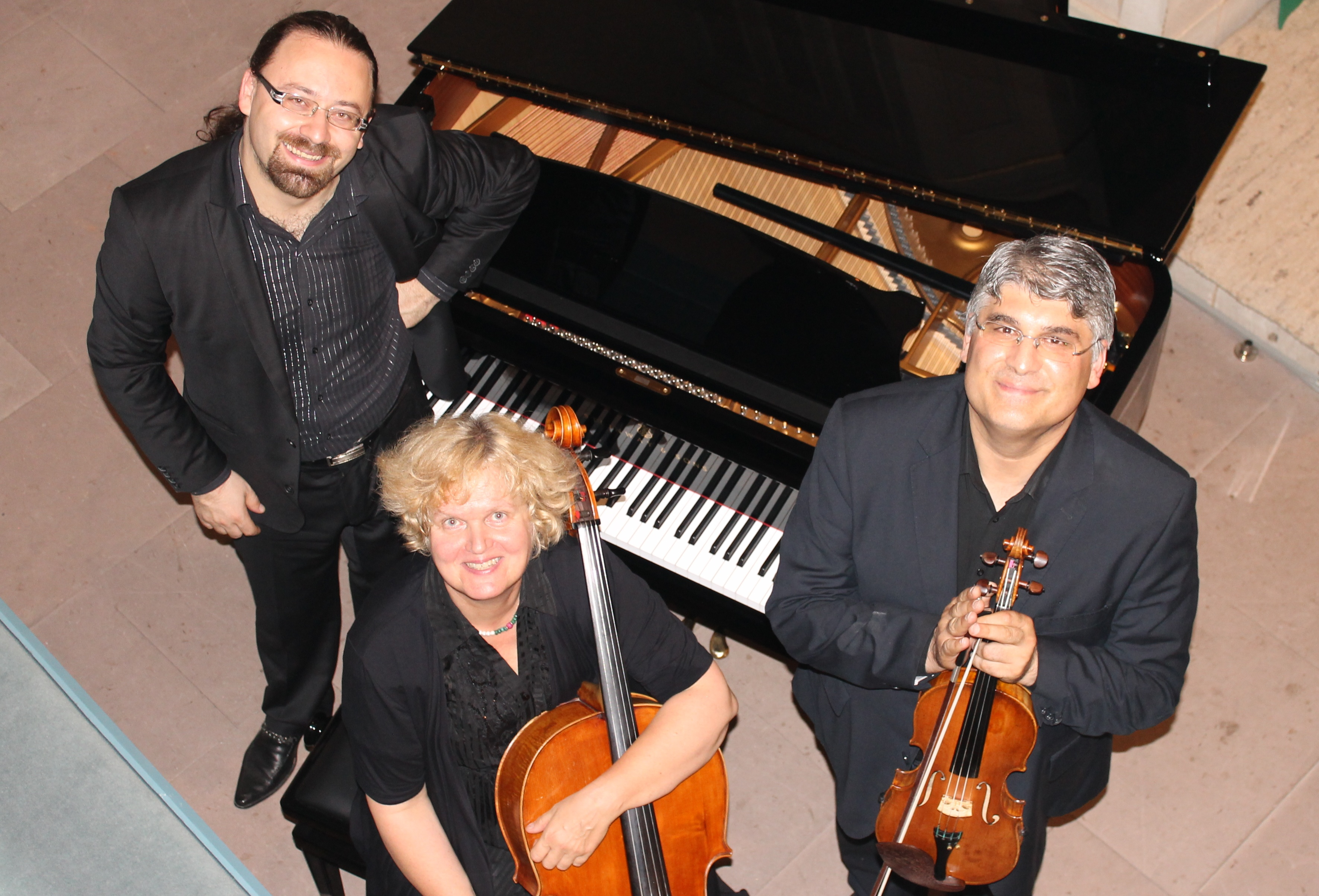 Klaviertrio Julian Dedu, Claudia Schwarze, Francesco Bottigliero